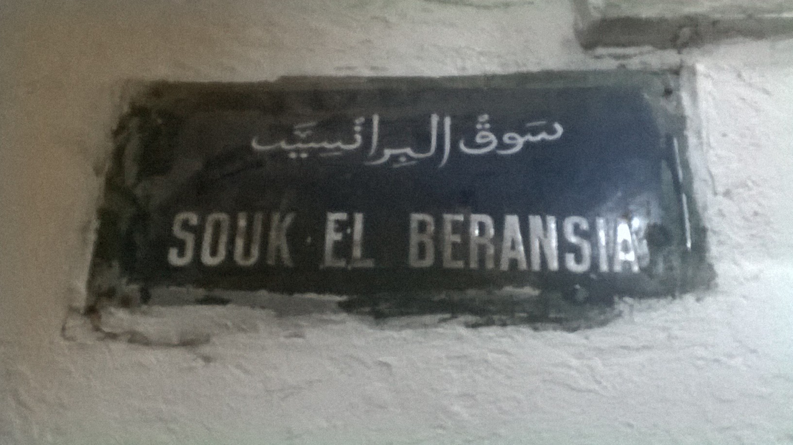 La médina de Tunis مدينة تونس العتيقة